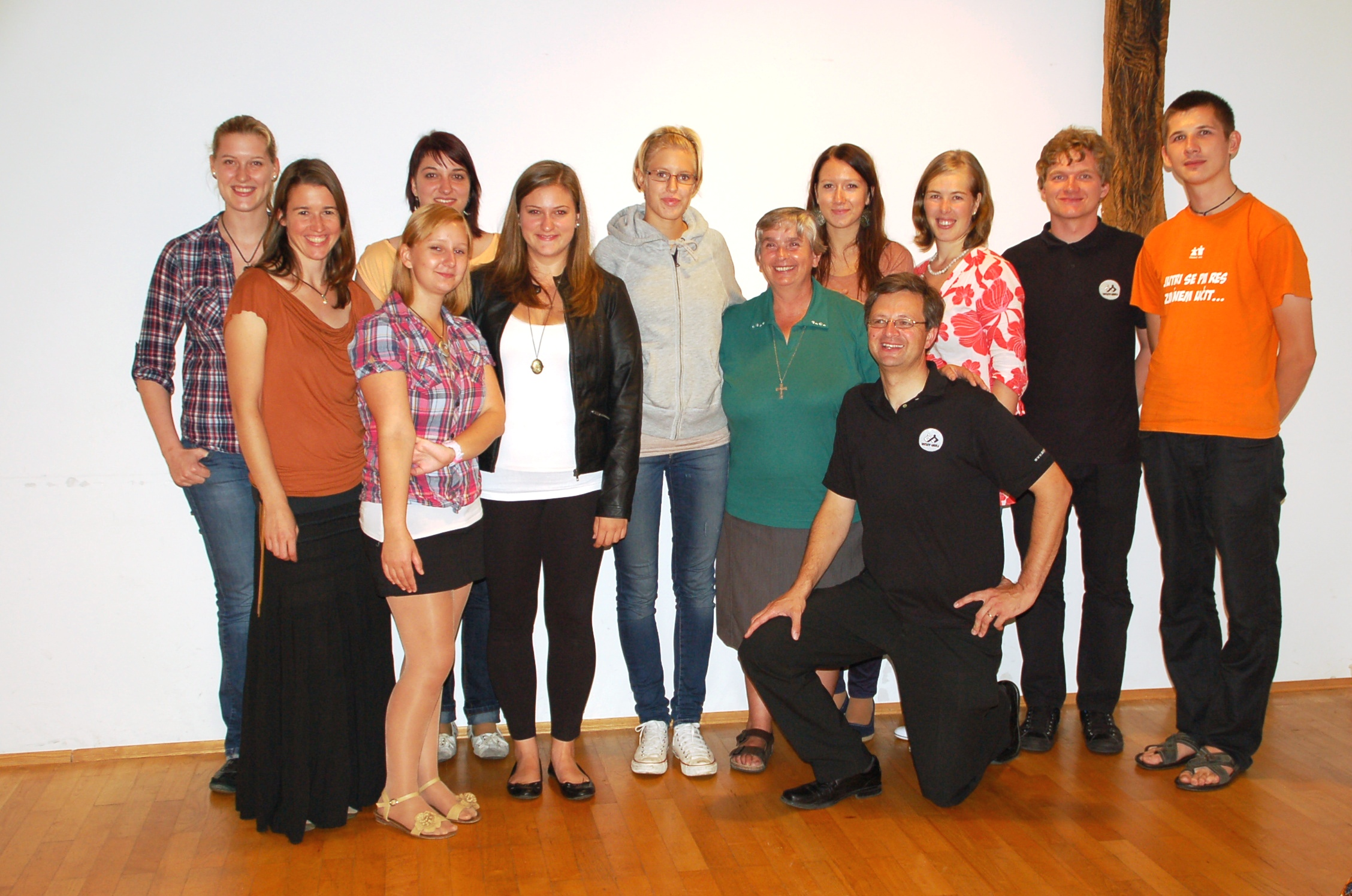 Odborniki z misijonarko sestro Lorello na obisku v Šentprimožu 2012